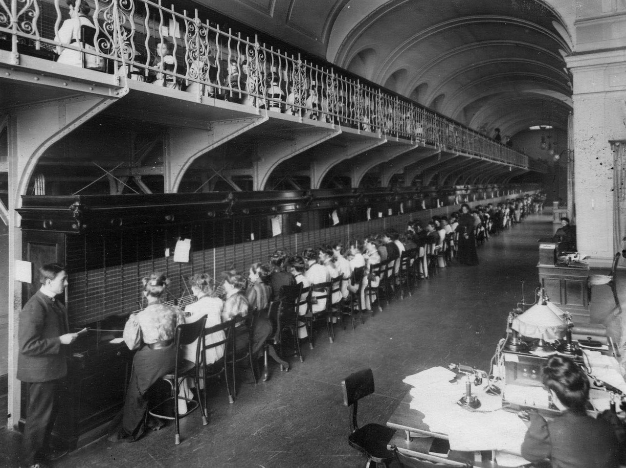 Телефонная линия С.Петербург-Москва. 1899 год